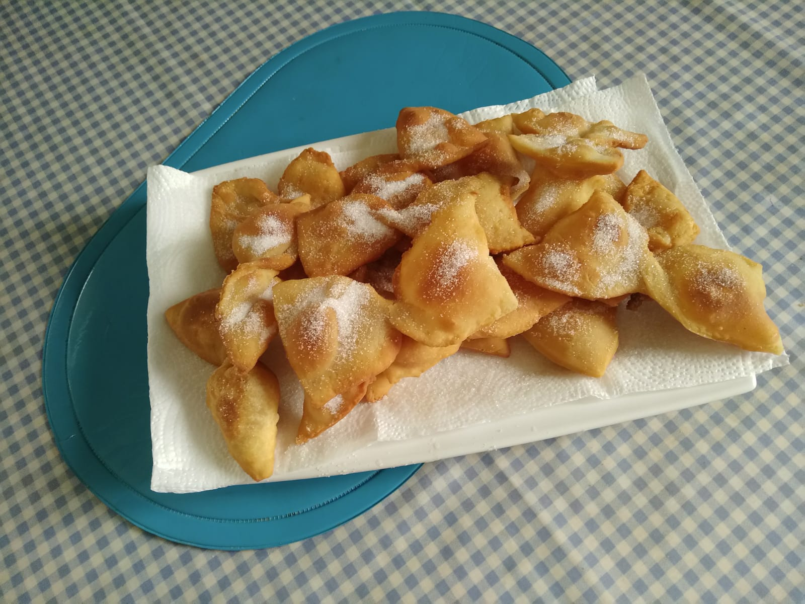 Orellas de carnaval caseras